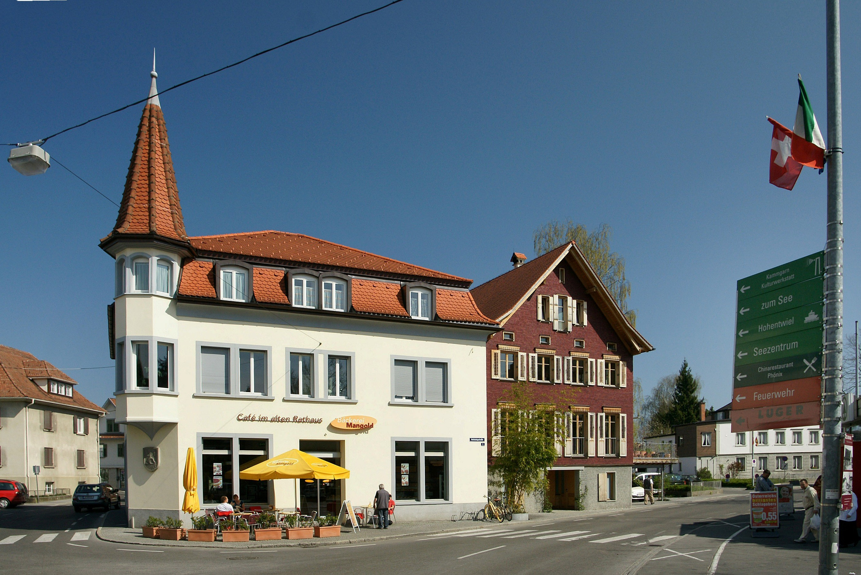 aus dem DEHIO Vorarlberg 1983: Hard, Hofsteigstraße Nr.1: Rathaus, spitz überhelmter Eckerker auf Fächerkonsole, 1909 erbaut, mehrere Umbauten seit 1911.